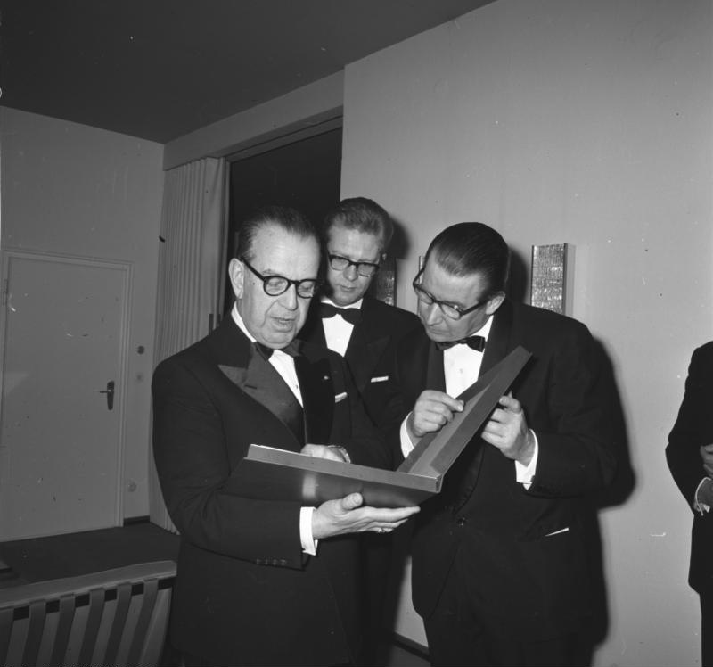 BM Schröder empfängt den türkischen Außenmin. Feridun Cemal Erkin, Venusberg